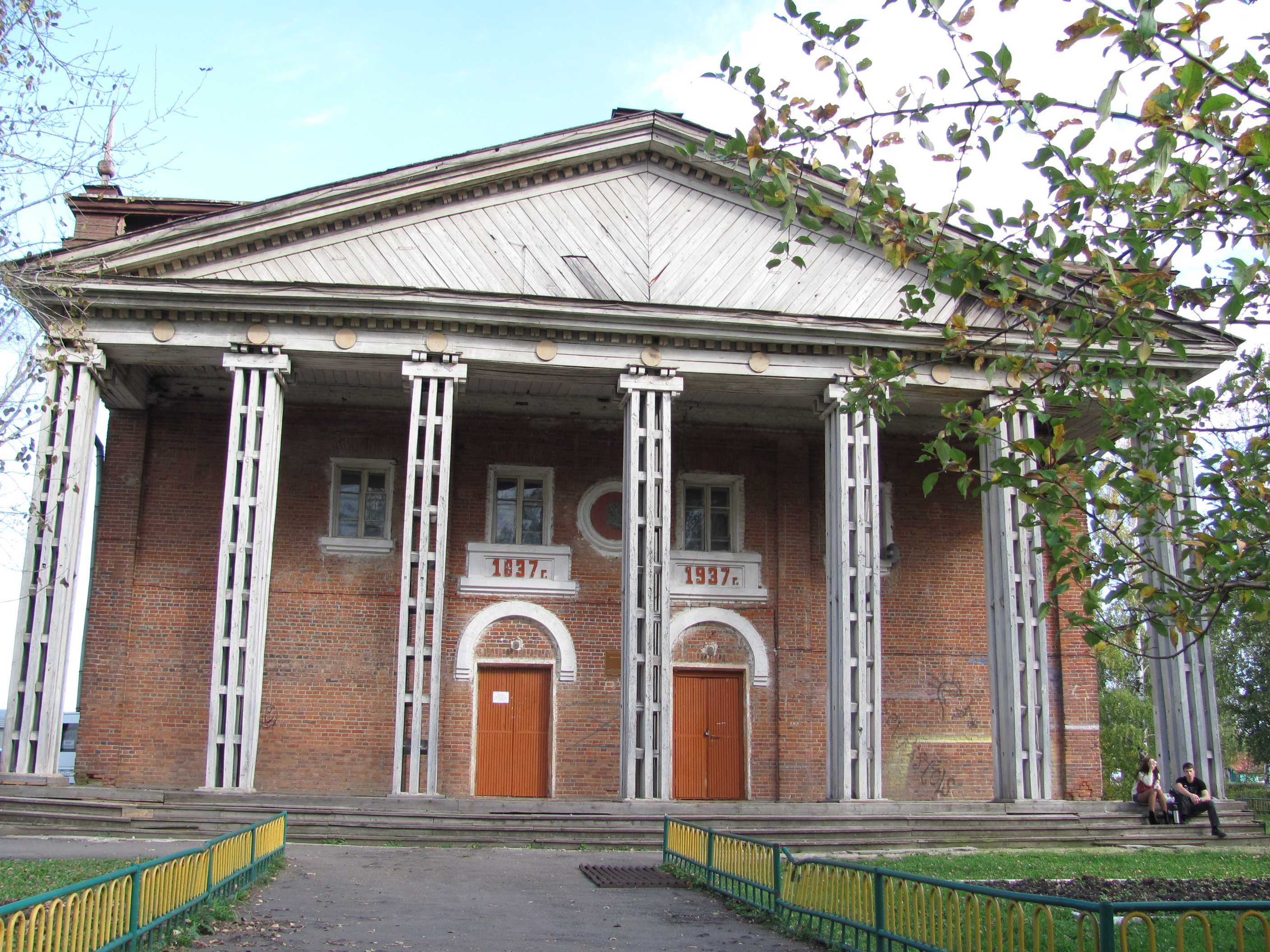 Большое Болдино, здание дома культуры, 1937.